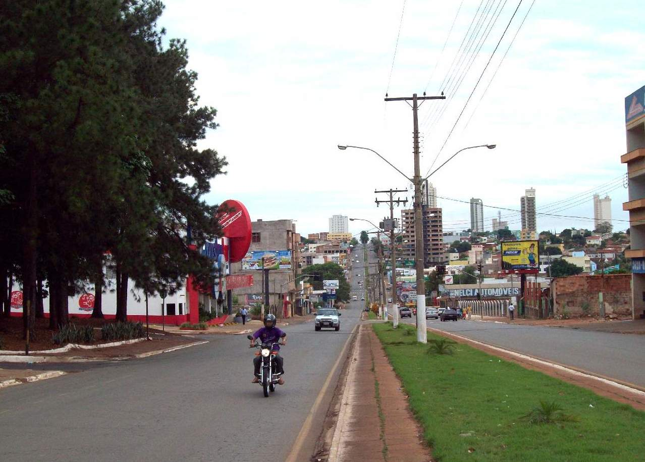 Rio Verde - Goías